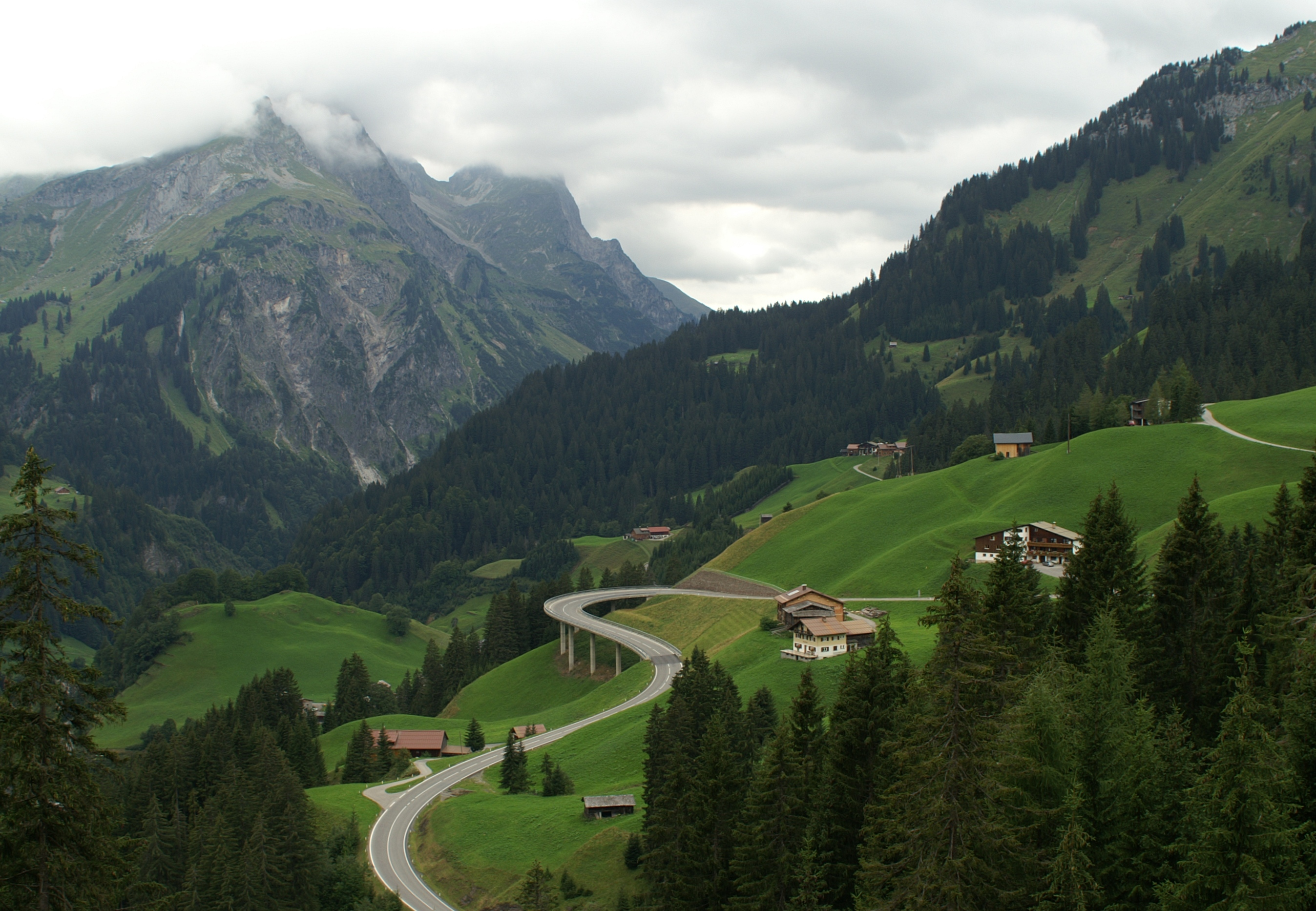 Strasse nach Nesslegg im Schröcken, Bregenzerwald